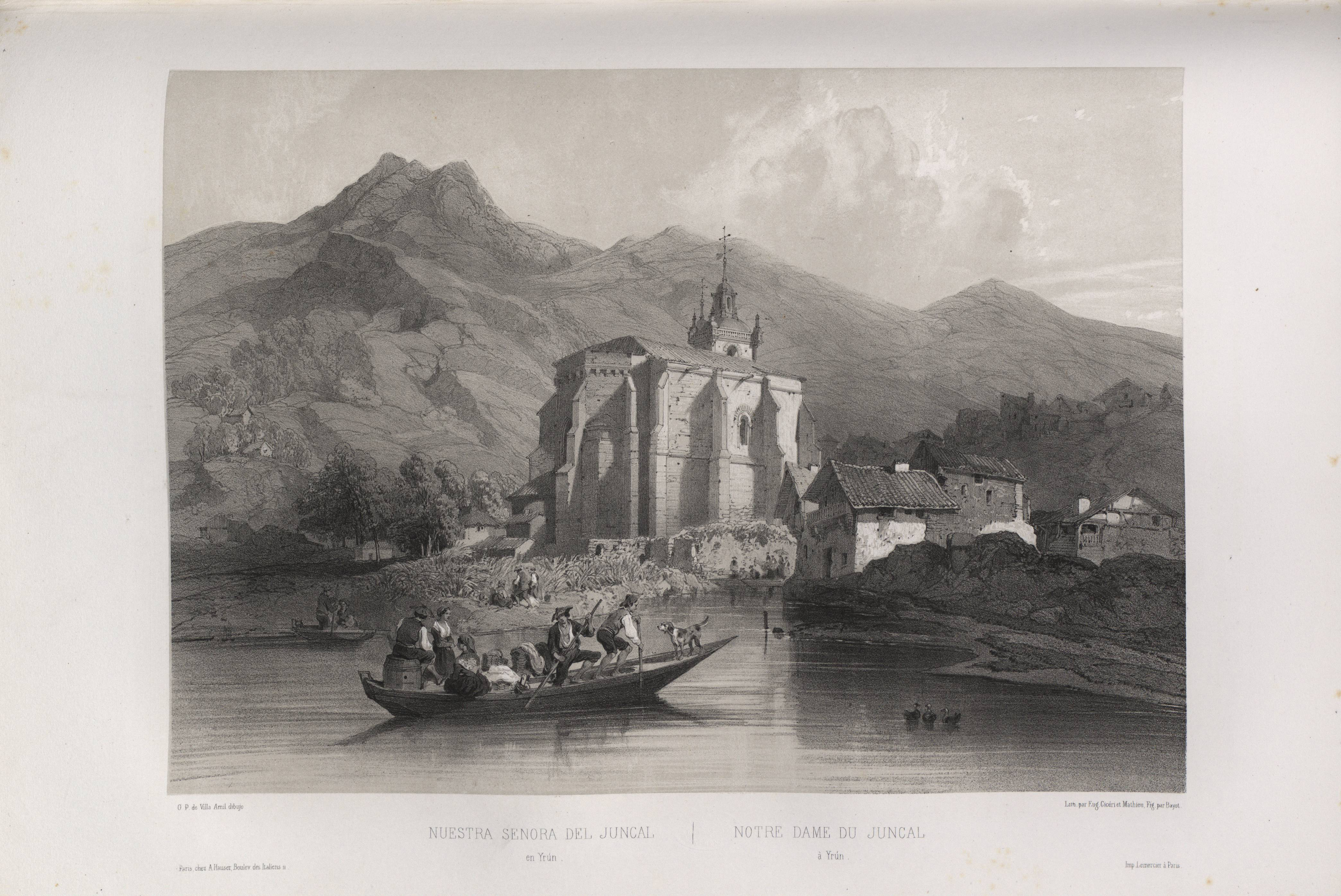 Nuestra Señora del Juncal en Yrún.